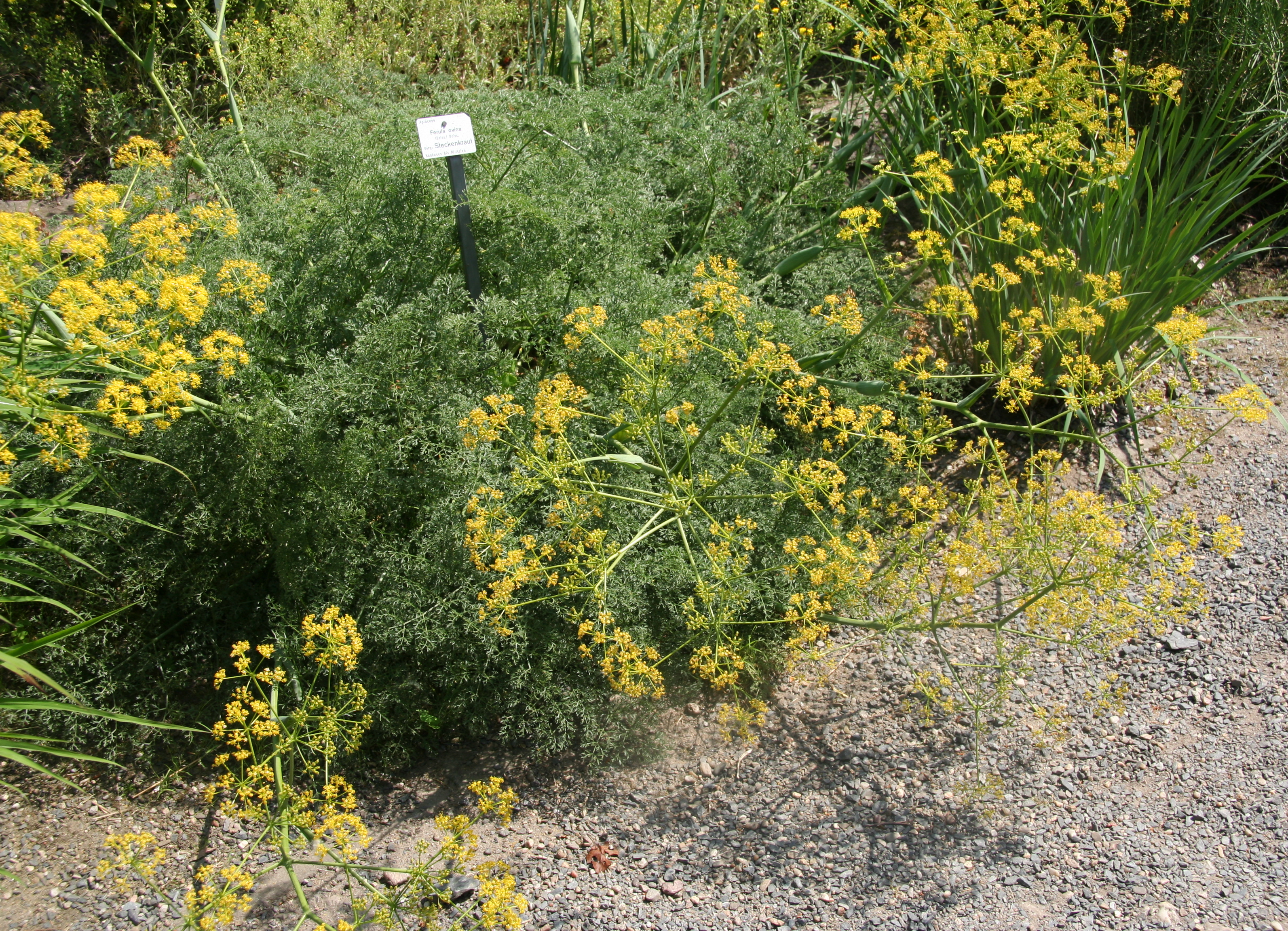 Ferula ovina im Botanischen Garten Dresden